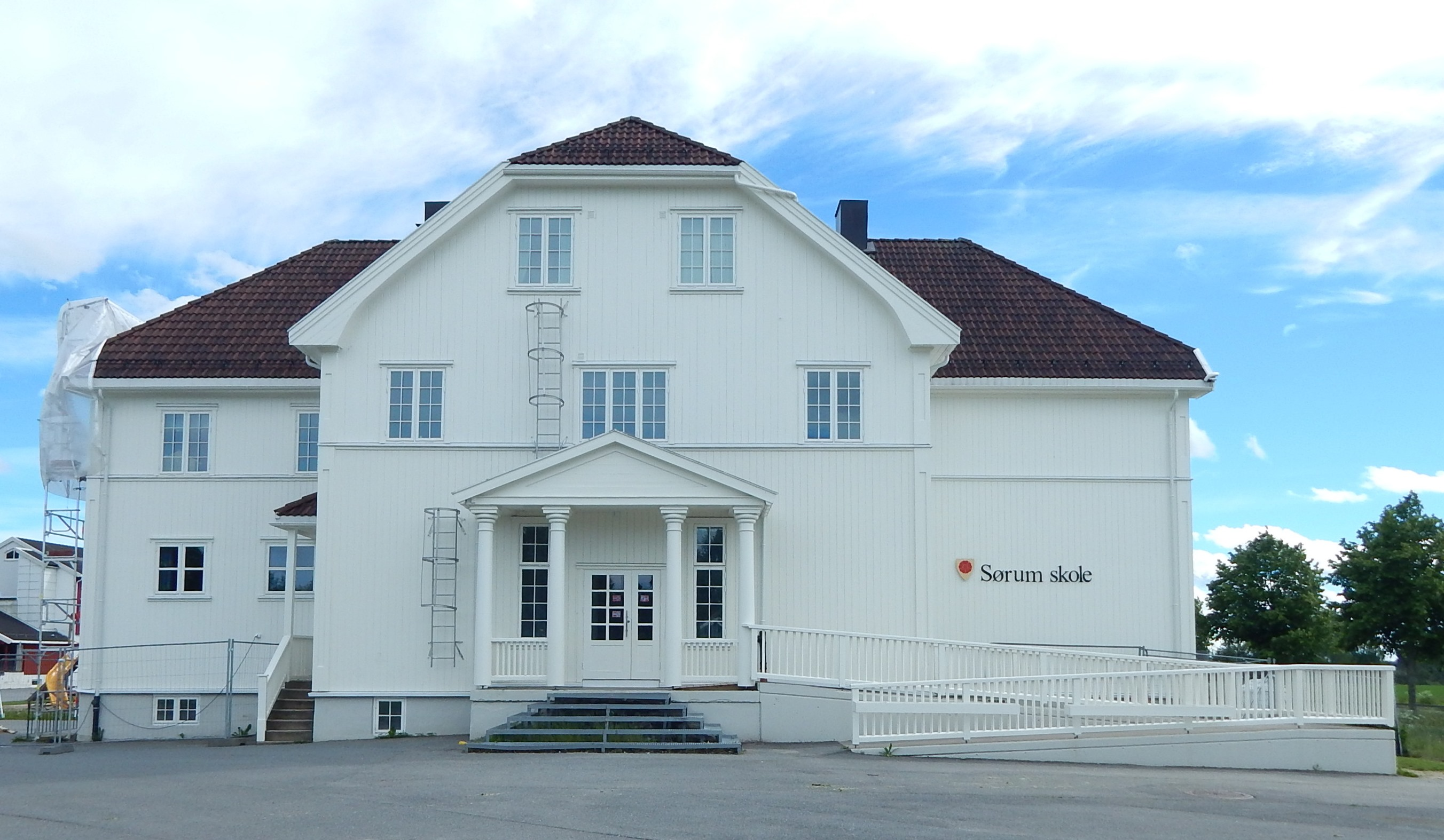 Den eldste bygningen ved Sørum skole